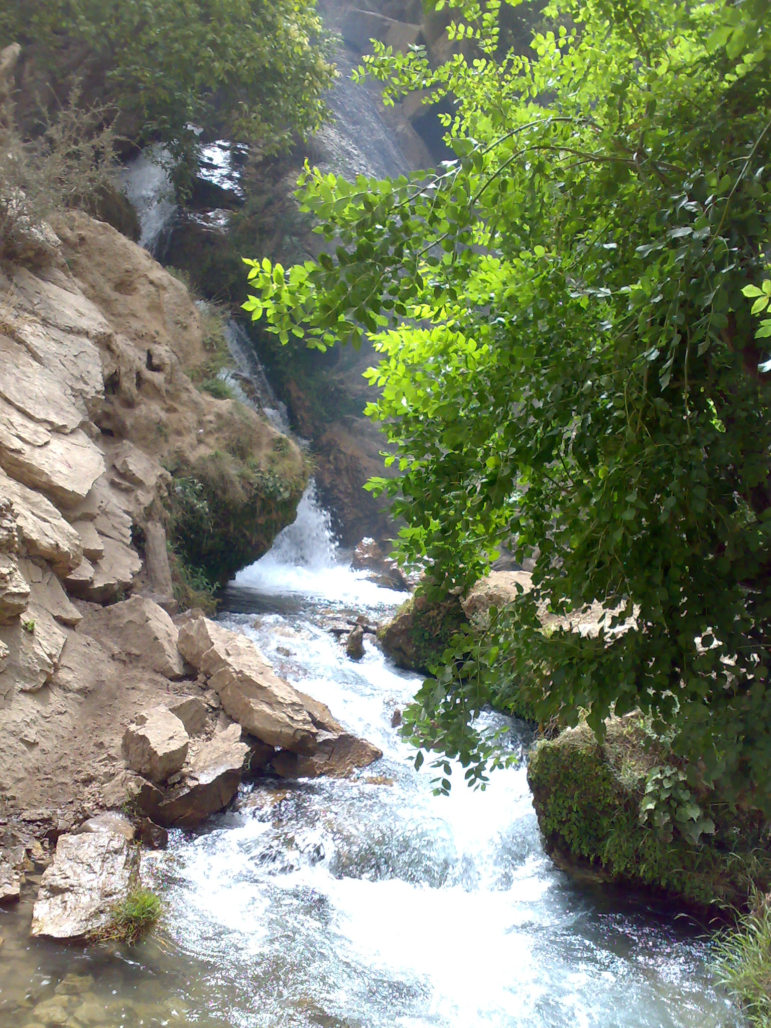 آبشار آتشگاه واقع در جنوب استان چهارمحال و بختیاری